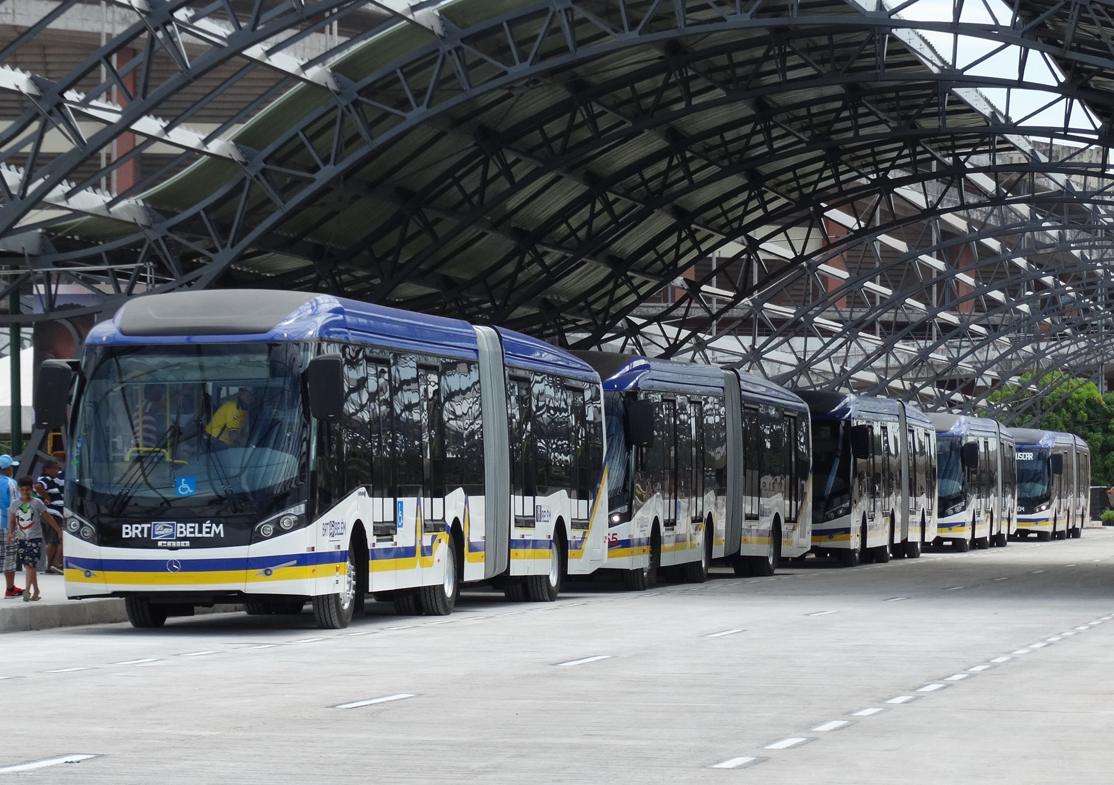 ônibus do brt belem estacionados na plataforma do terminal do mangueirão.